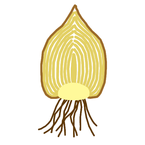 Morfología del tallo. Tipo: bulbo. Según Simpson (2005) Plant Systematics.